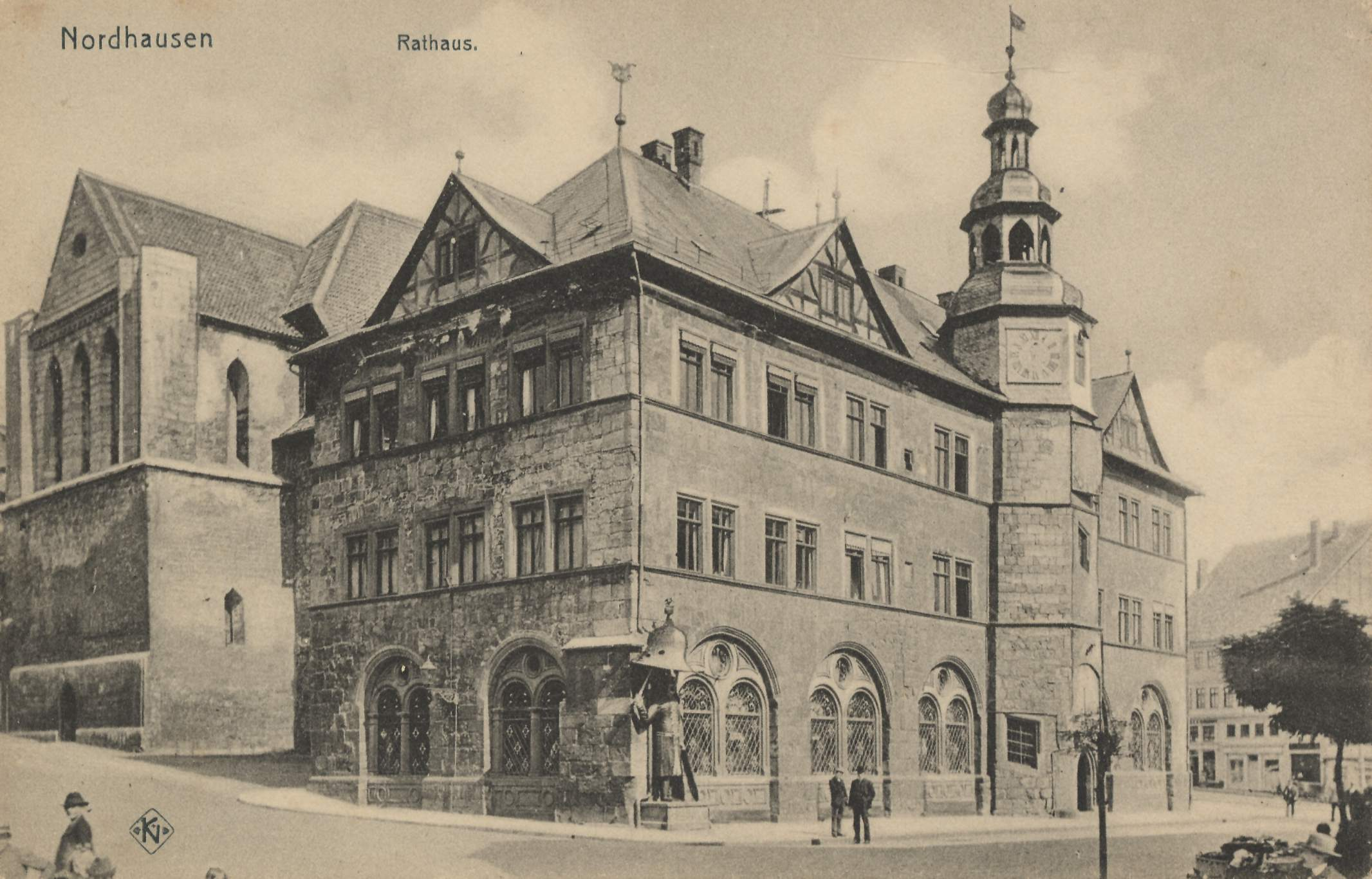 Nordhausen, Rathaus, mit Roland, und St.-Nikolaikirche